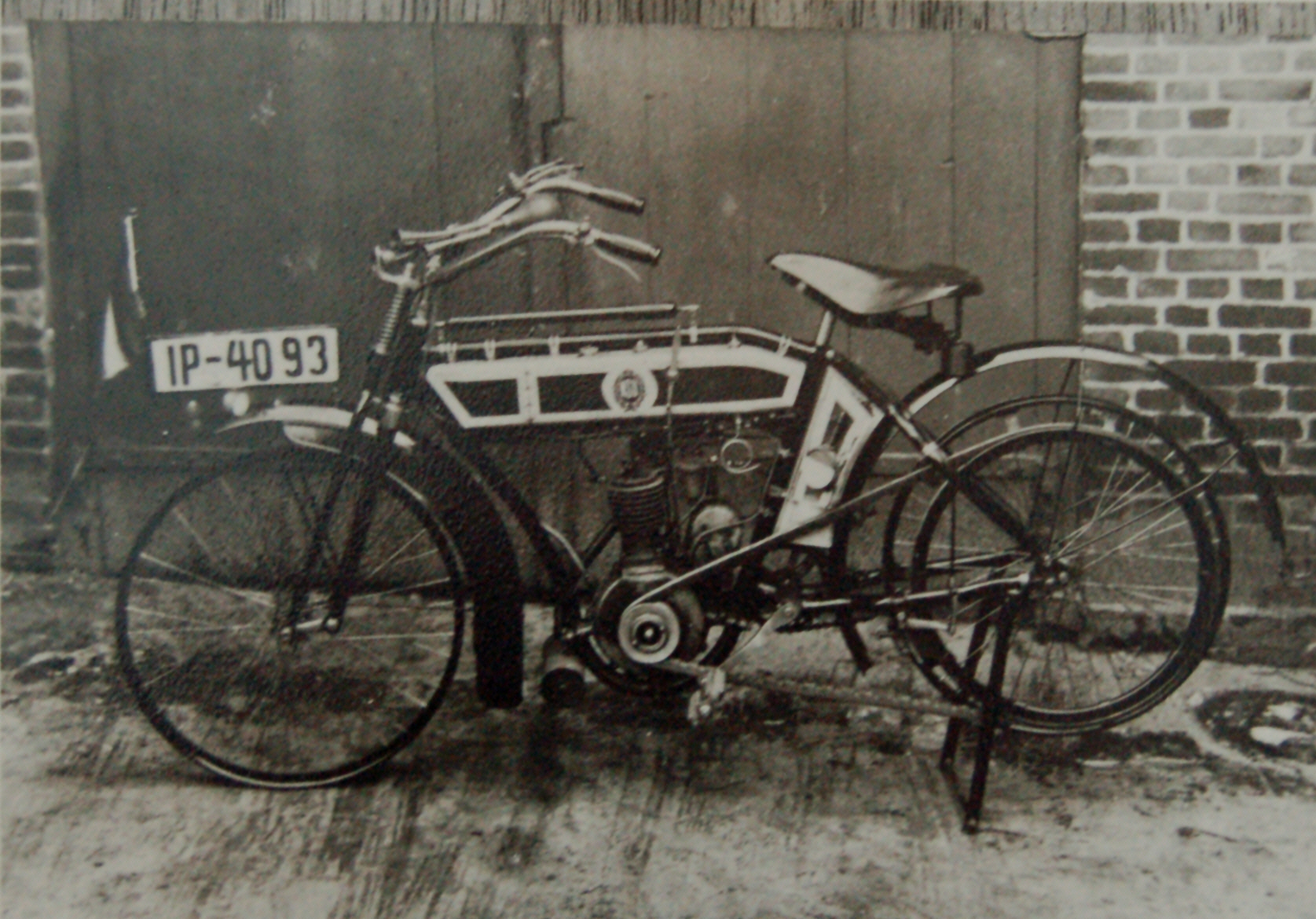 Das erste Motorrad in Uetersen, Foto um 1906